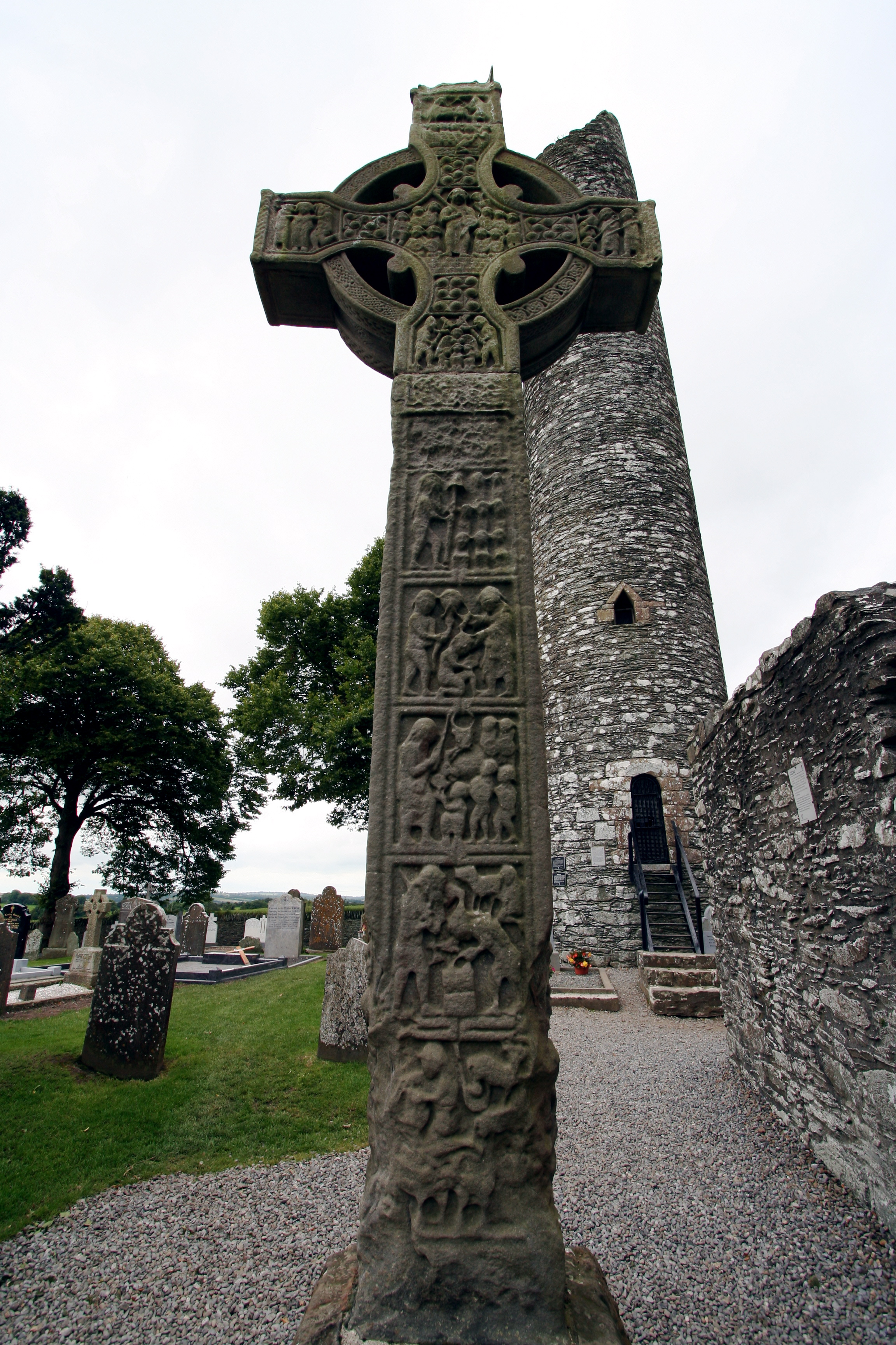 MonasterboiceMonasterboice 09